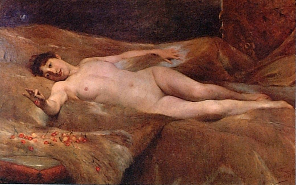 retrato de una hermosa mujer en el divan